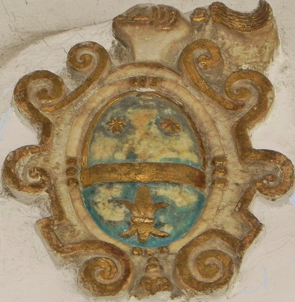 Blasone apposto sulla tomba di Giovan Tommaso II Polizzi e Trigona (1566-1582) nella cappella gentilizia di S. Pietro di Piazza Armerina